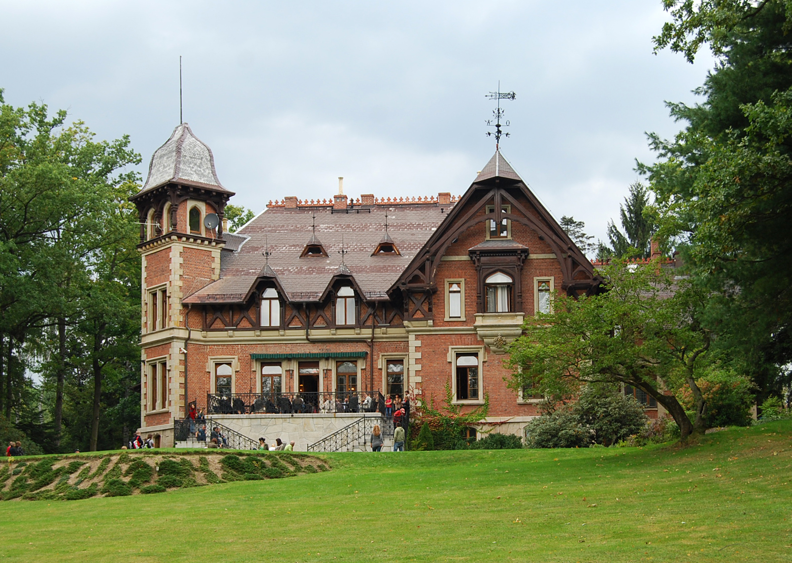 Pałac Dębowy w Karpnikach, koło Jeleniej Góry